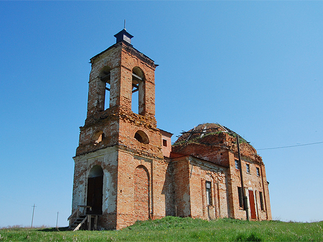 Храм в честь Покрова Божией Матери в Подгорном